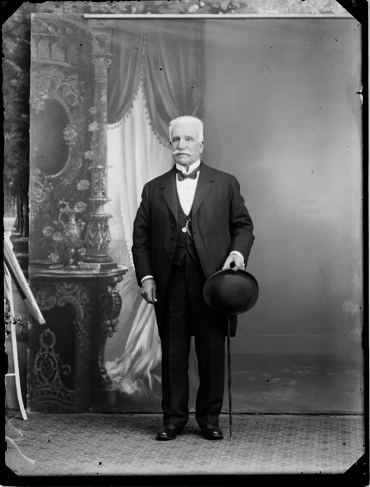 Primer Intendente de Beazley